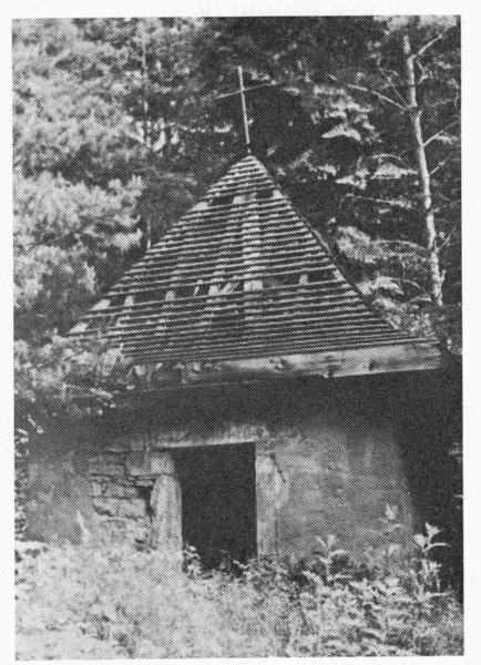 Chapelle actuellement ruinée, appelée chapelle des pestiférés, située à l'ouest du hameau de la Haute-Neuveville, commune de Raon-l'Étape 88372.